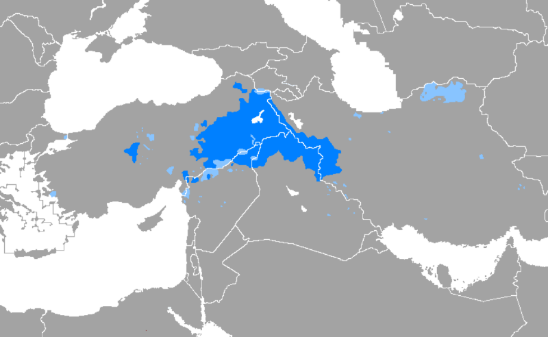 Idioma kurdo en oriente medio